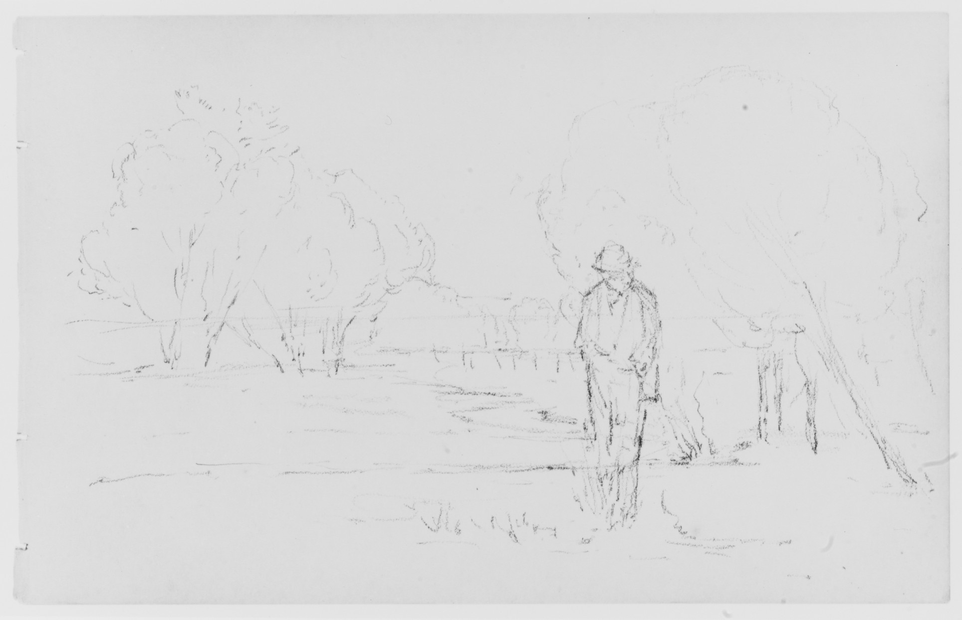 Drawing; Drawings